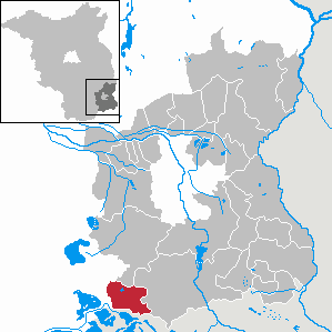 Welzow in Brandenburg (Country) - District Spree-Neiße